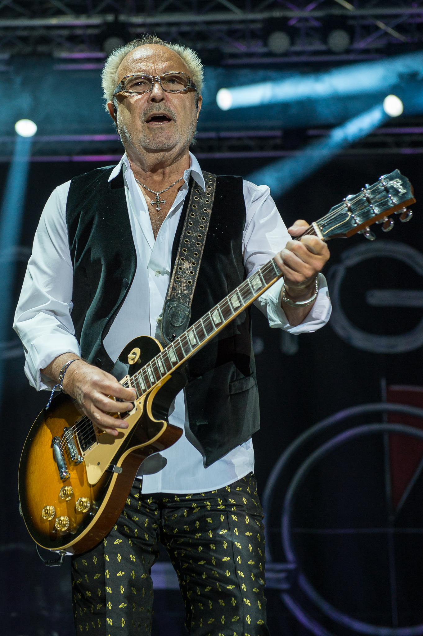 Brombachsee,Concertbüro Franken,Festival,Foreigner,Konzert,Lieder am See,Livekonzert,Livemusik,Mick Jones,Musik